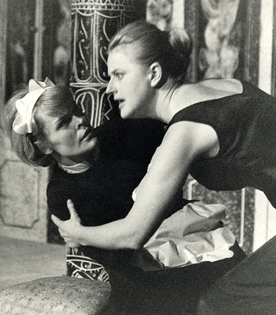 Jean Genet, Služkinji, SNG v Mariboru. Na fotografiji: Bogdana Bratuž (Solange), Milena Muhič (Claire).